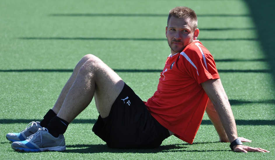 John Alvbåge